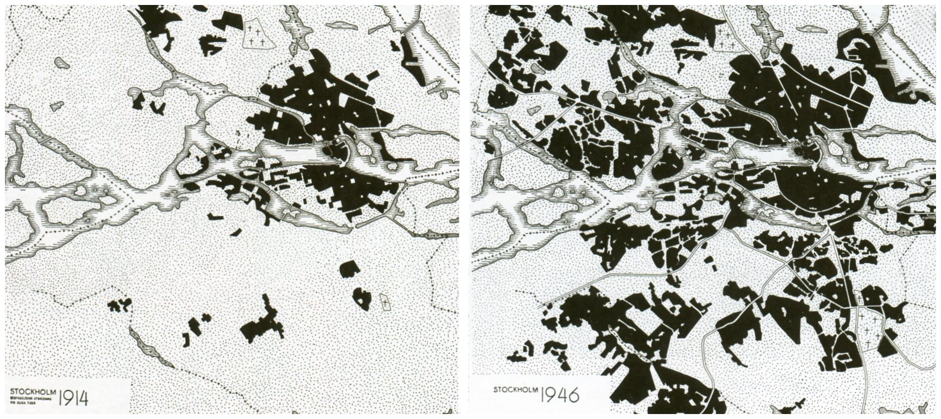 Stockholms stads expansion mellan 1914 och 1946